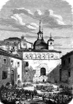 Plaza de la Paja in 1860. Madrid, Spain